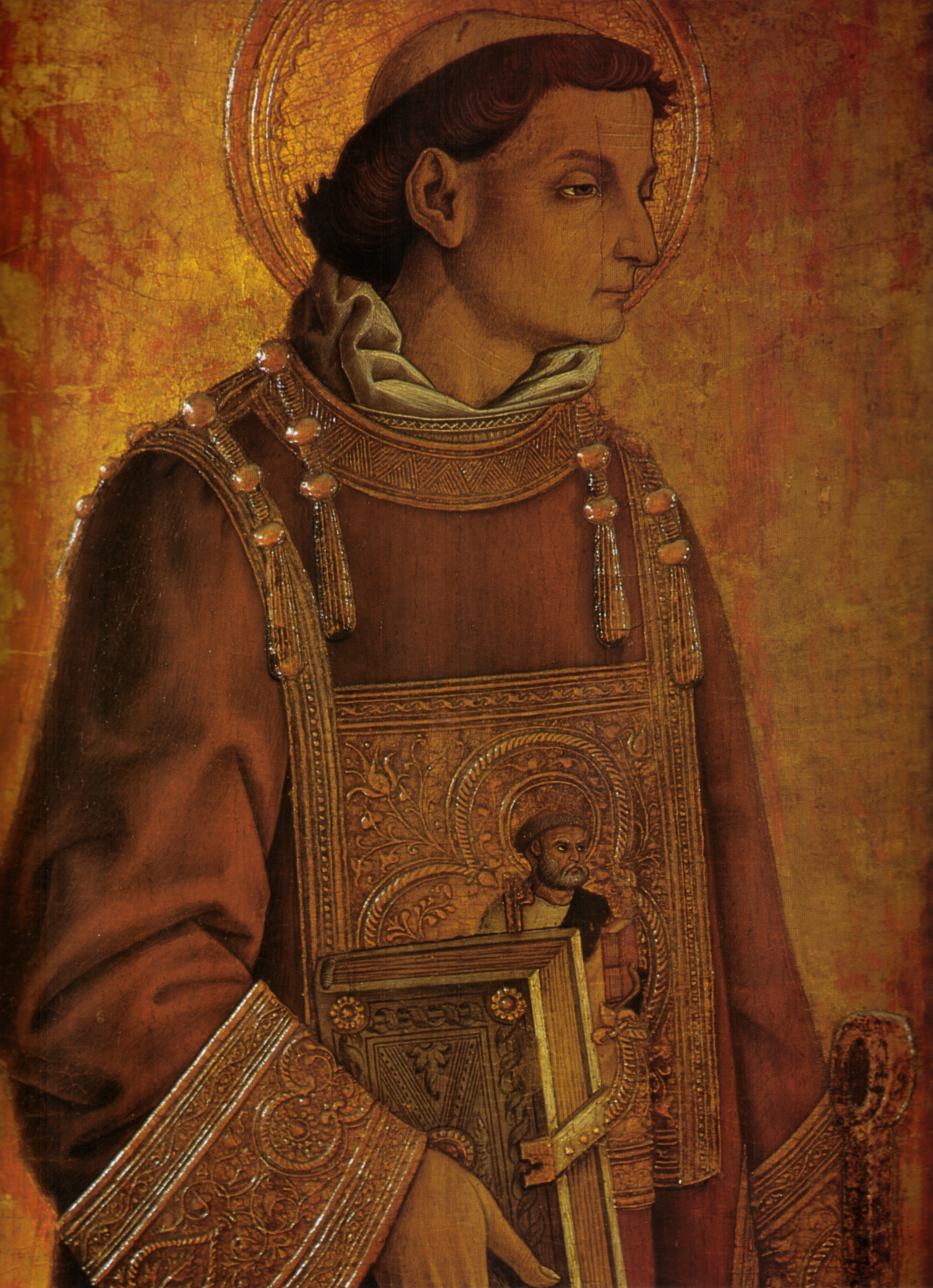 Carlo crivelli, polittico di massa fermana, san lorenzo